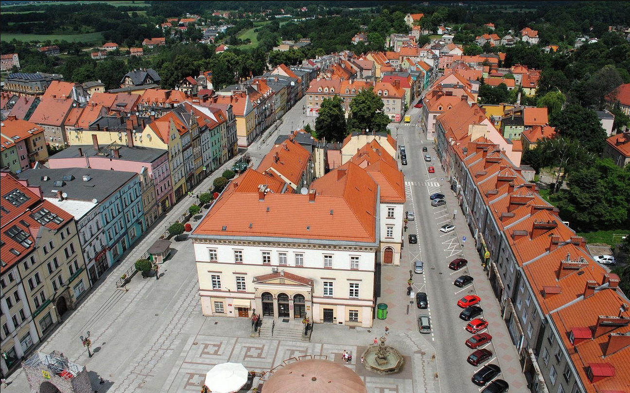 Ratusz w Złotoryi